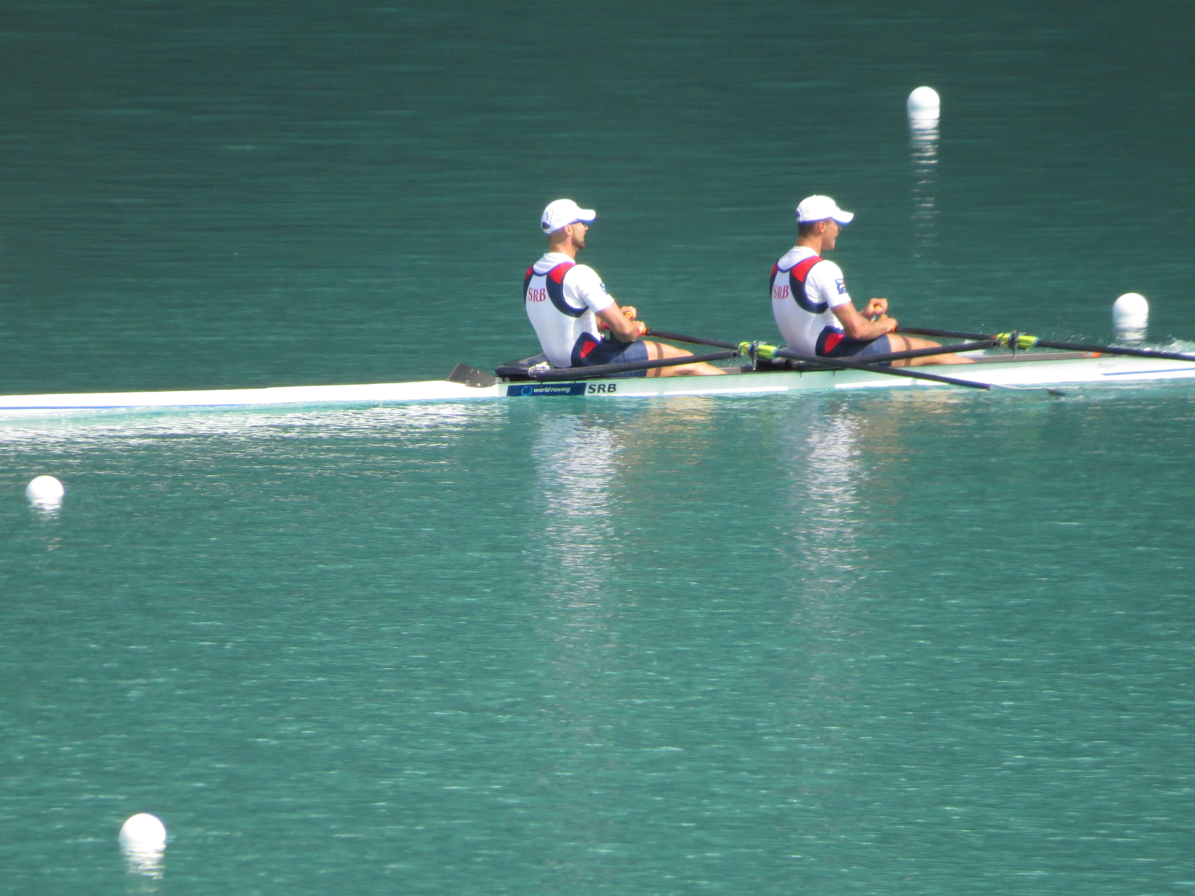 Demi-finale C/D M2x SRB : MARJANOVIC, Marko SLJUKIC, Andrija